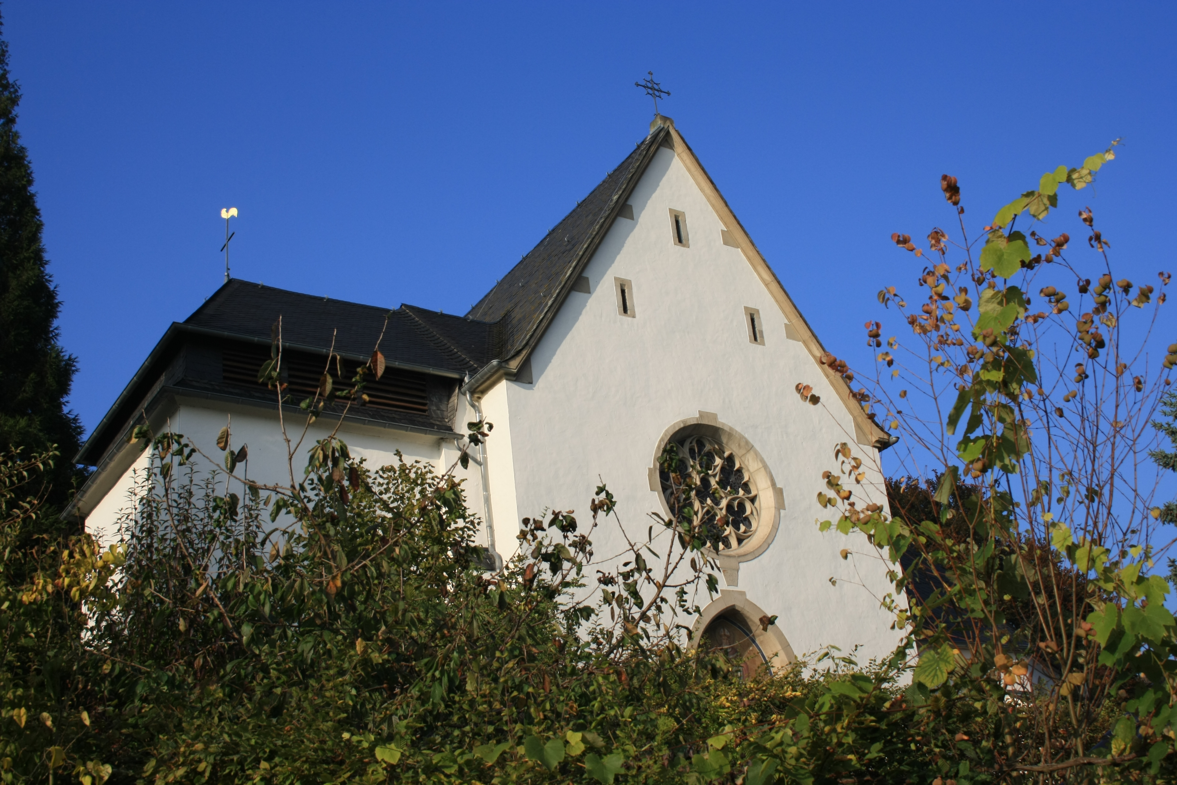 katholische Pfarrkirche St. Lambertus in Kirchdaun, Südansicht